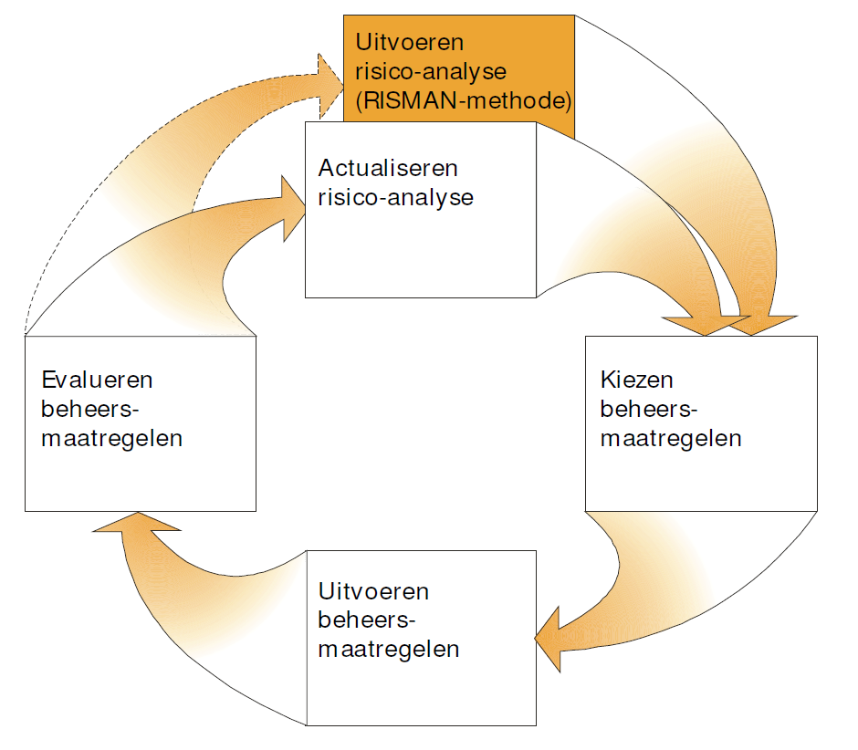 Procesbeschrijving RISMAN